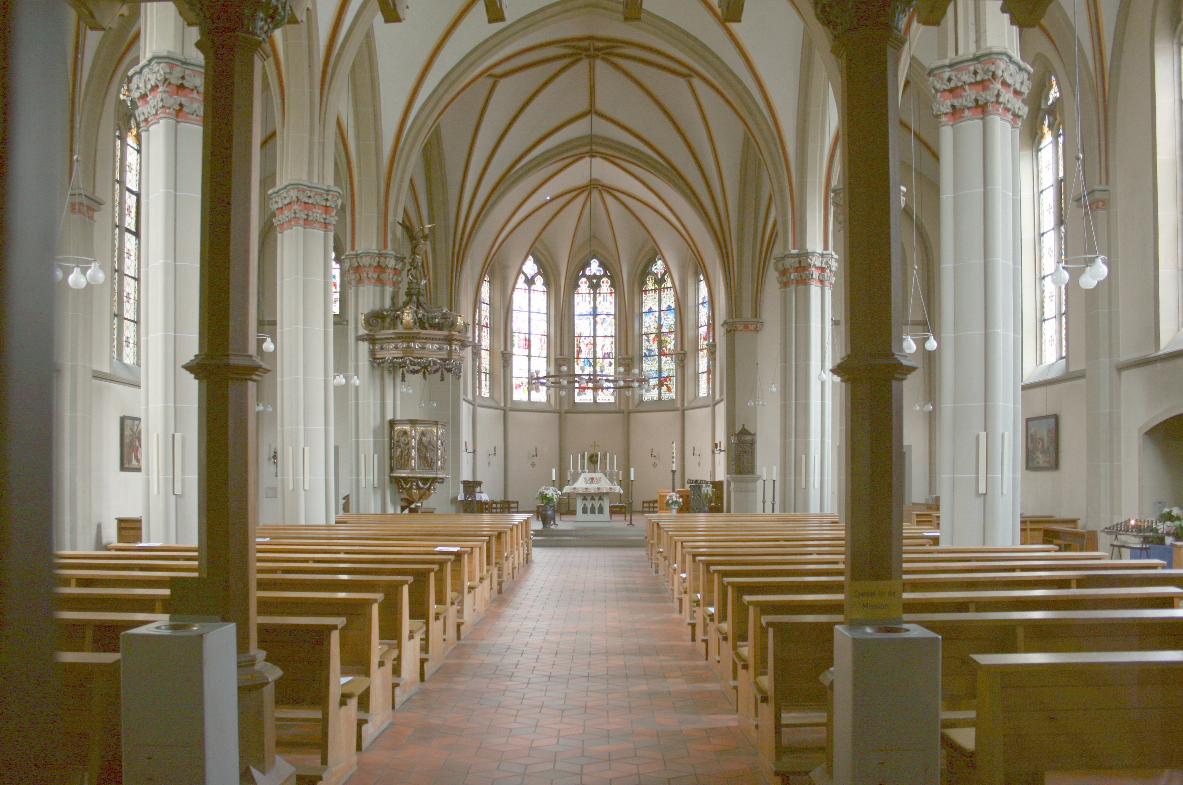 St. Johannes Baptist in Leichlingen